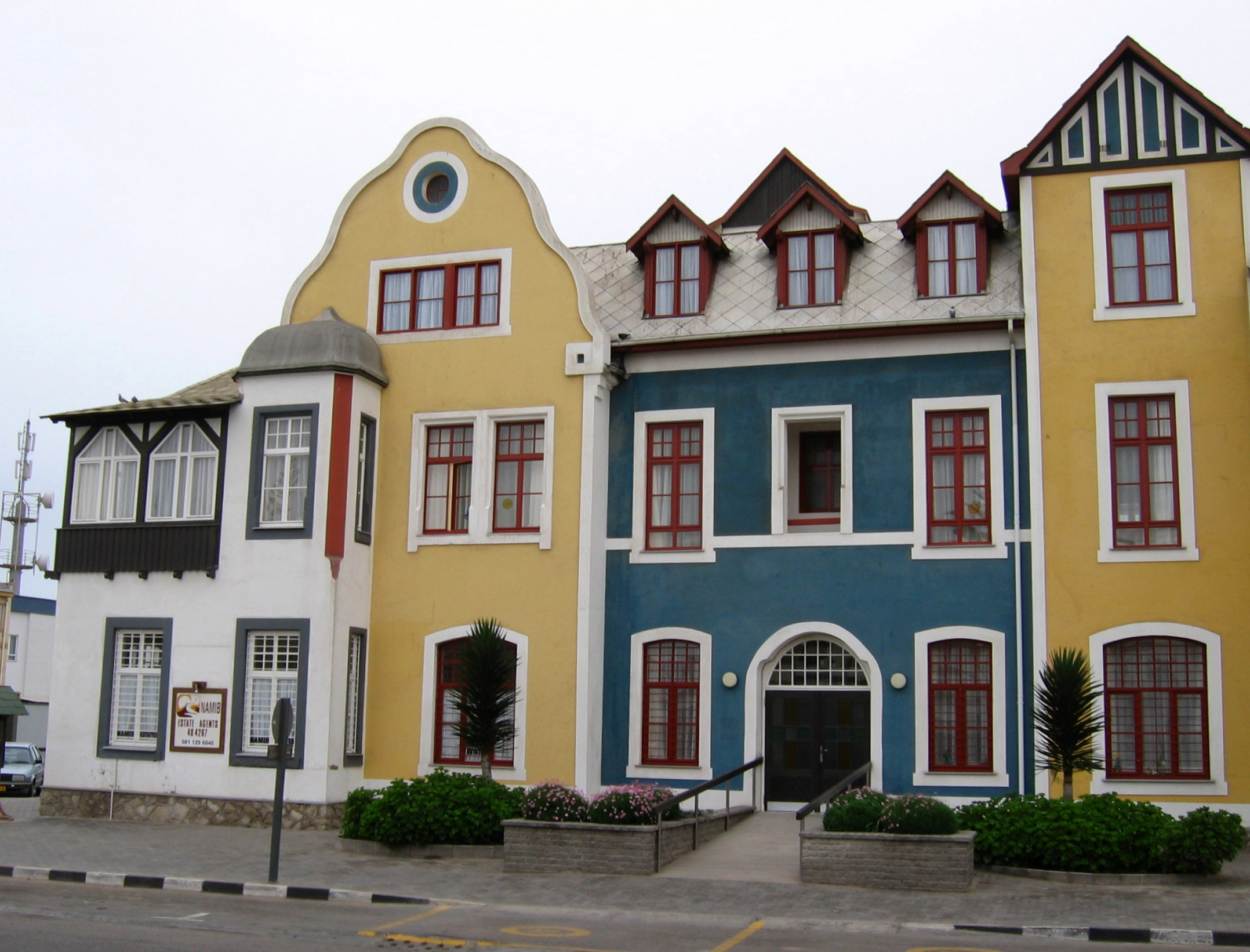 Antonius-Gebäude in Swakopmund, Namibia, von 1908 bis 1987 ein Franziskaner-Krankenhaus